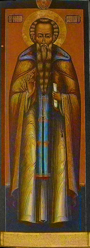 Преподобный Филипп Ирапский. Образ на раку. 1669 г. Находится в Череповецком музее.